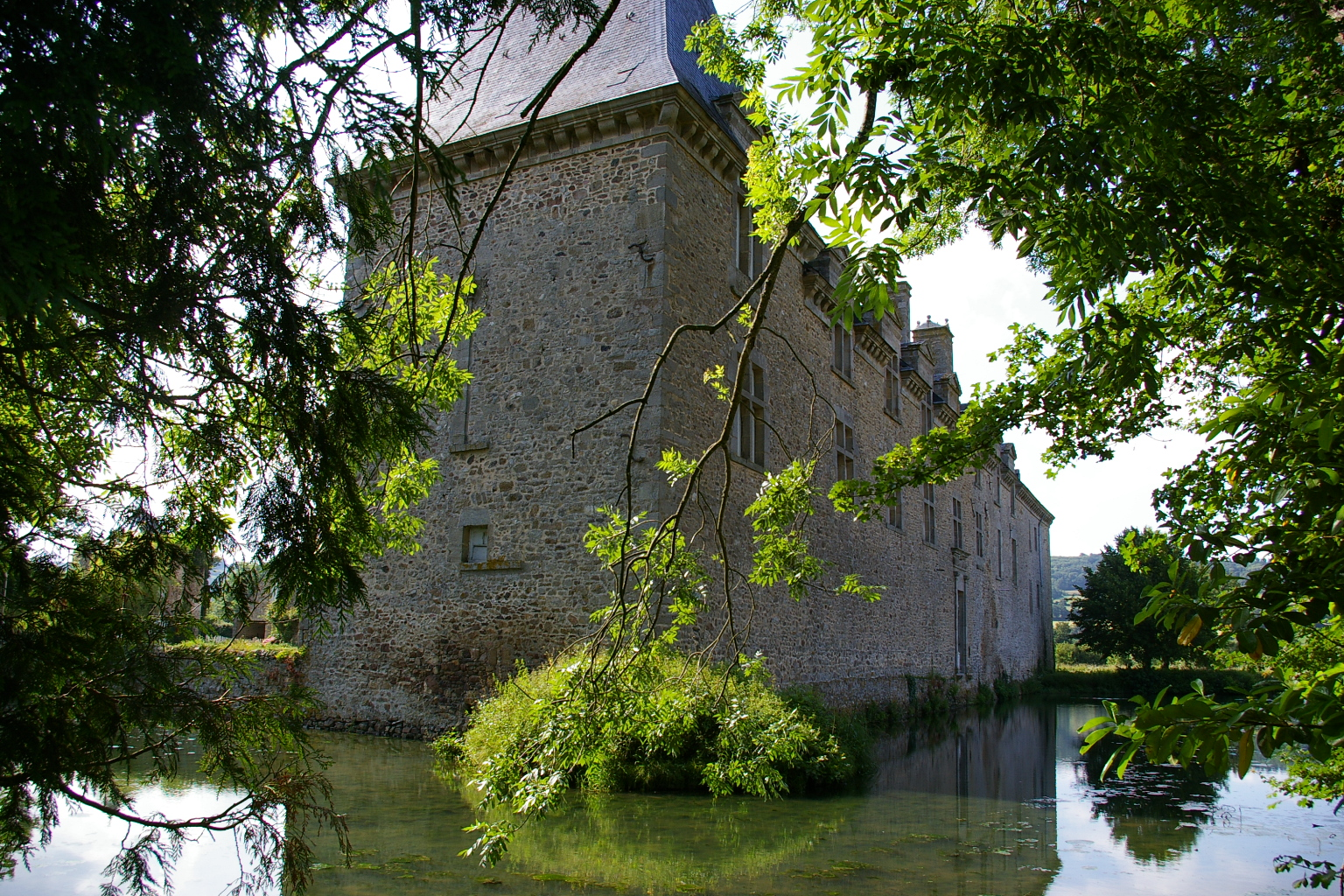 Douves du château de Foulletorte à Saint-Georges-sur-Erve (53)